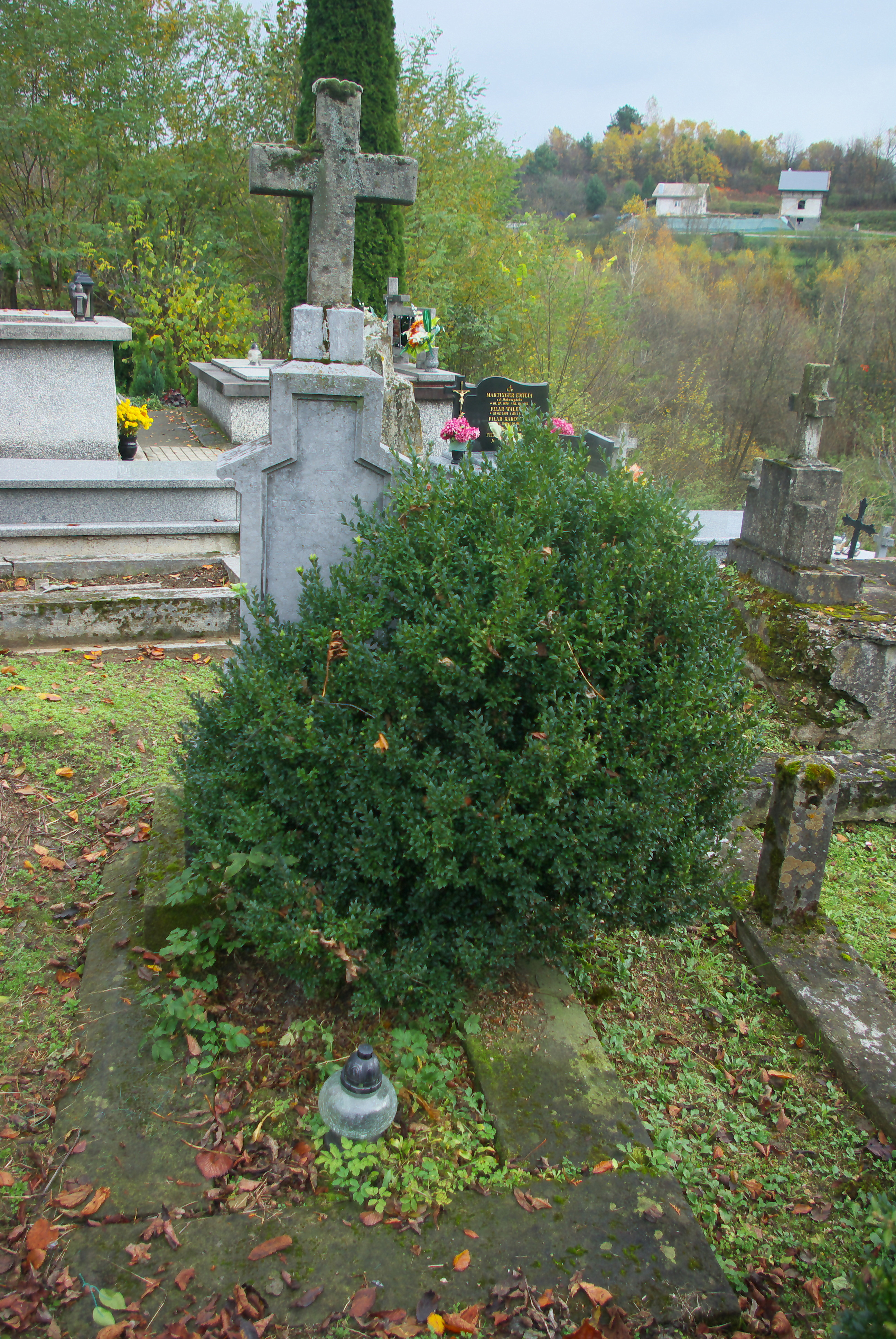 Nagrobek ks. Ludwika Praszałowicza na cmentarzu w Lesku (2017)